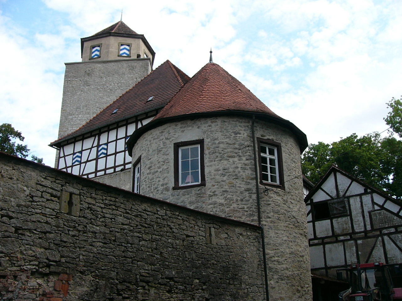 Älterer Teil der Burg- bzw. Schloßanlage in Aschhausen